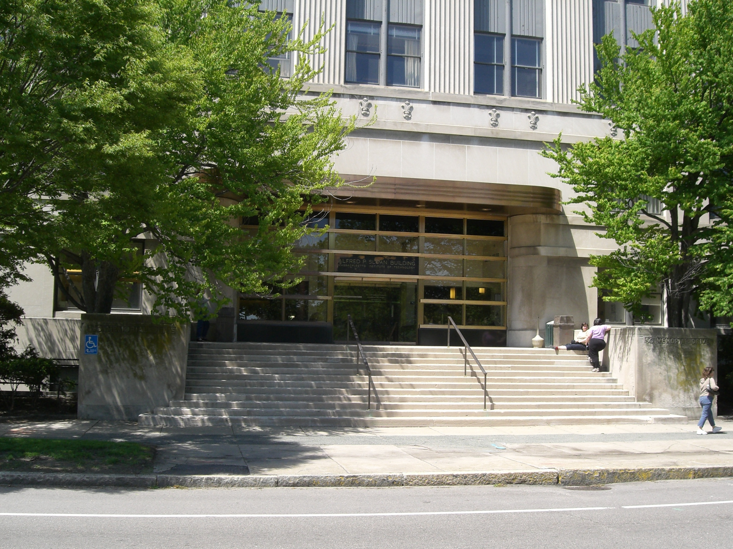 MITsloan, Sloan Building